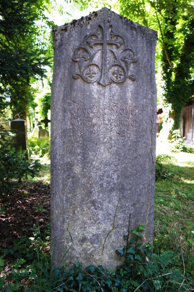 Grab des Malers und Zeichners Theodor Kotsch (1818-1884) auf dem Alten Südlichen Friedhof in München